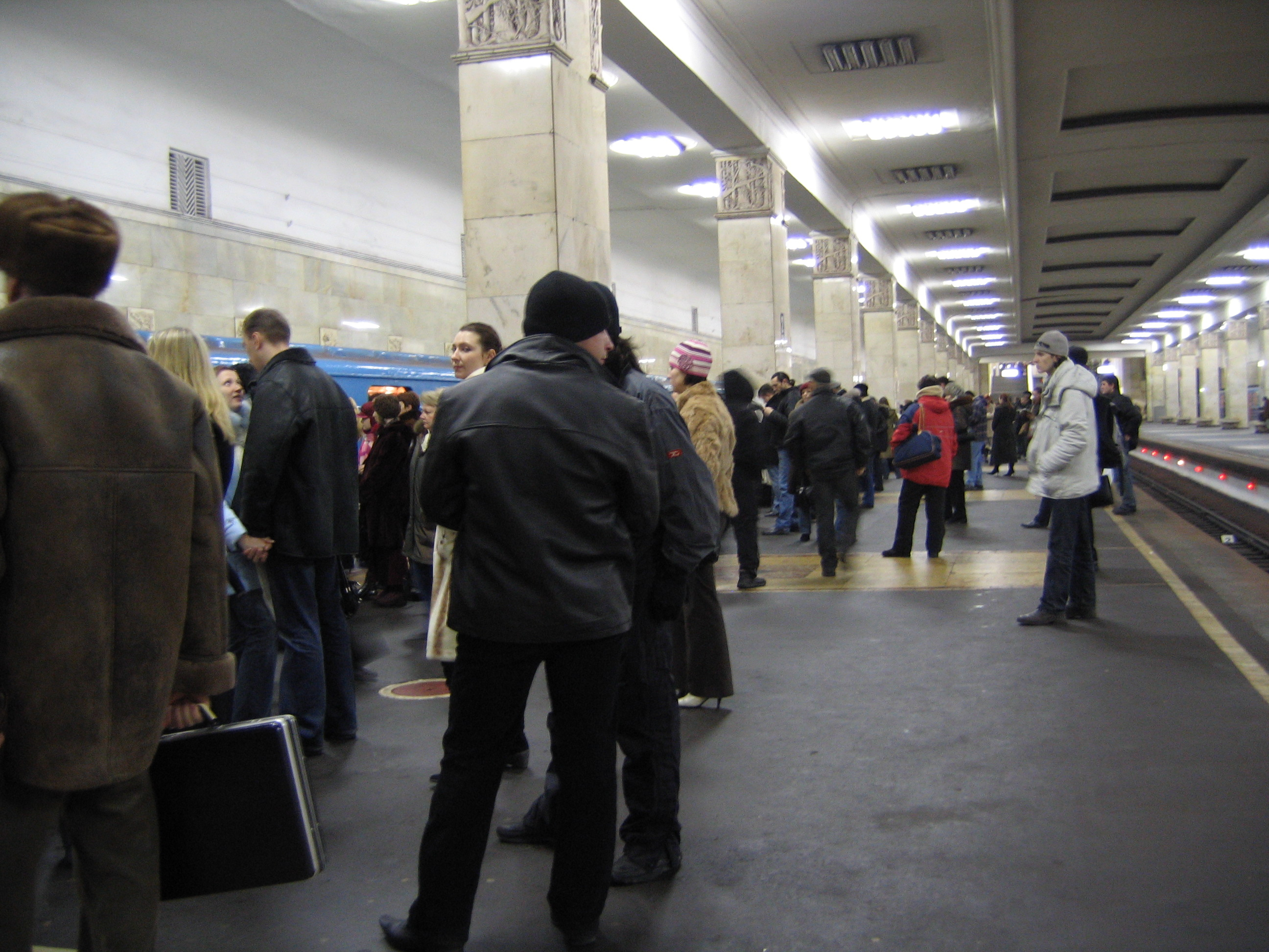 Станция метро «Партизанская» в час пик.